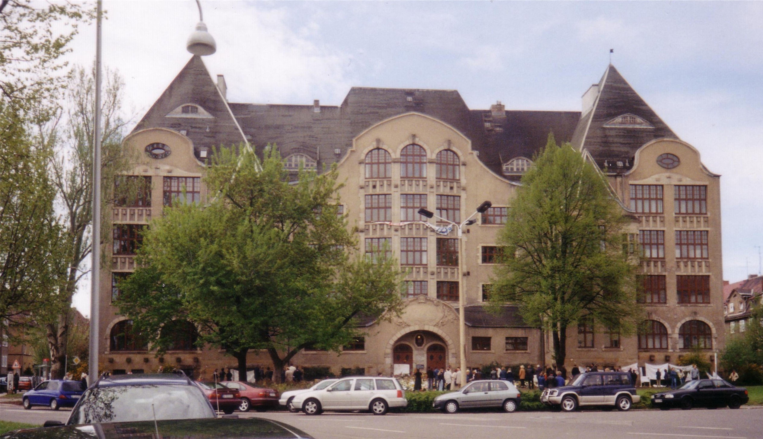 Das Erfurter Gutenberg-Gymnasium am 5. Mai 2002, wenige Tage nach dem Amoklauf